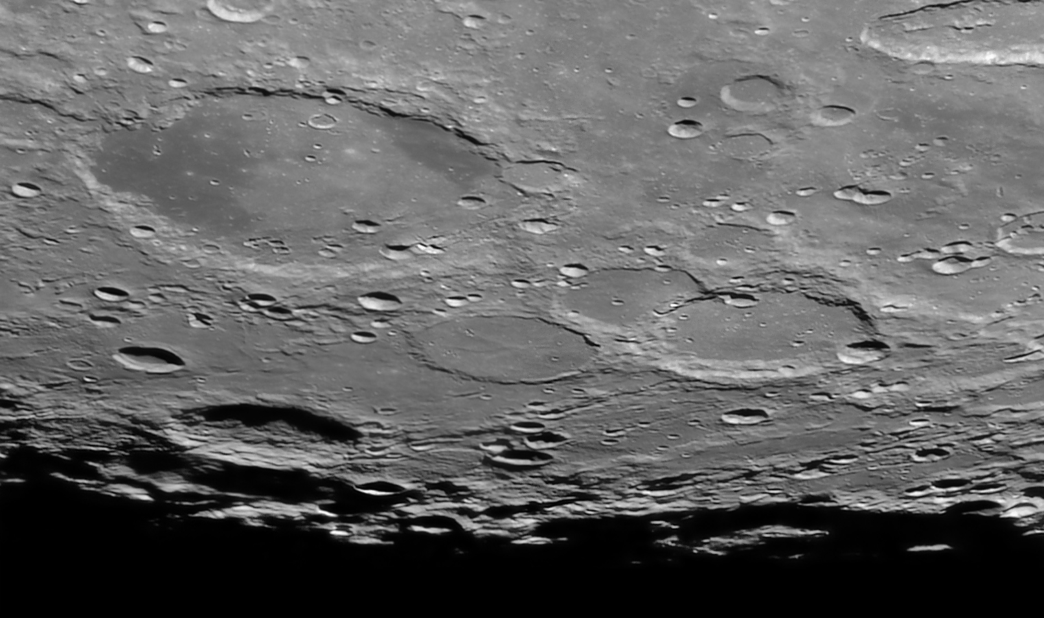 De izquierda a derecha pueden verse los cráteres de Schickard, Wargentin, Nasmyth, y Phocylides.